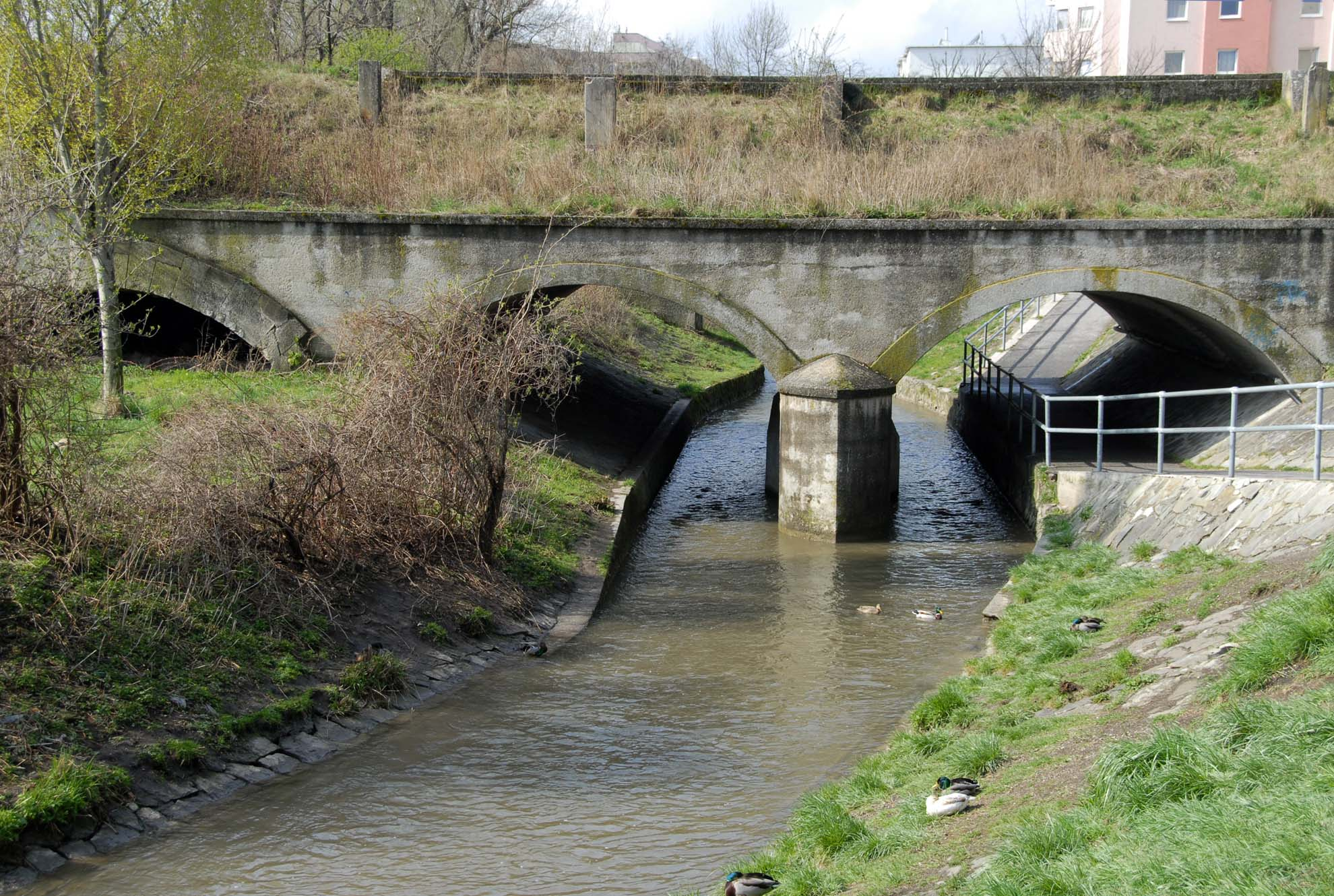 Das Aquädukt des „Wiener Neustädter Kanals“ über die „Warme Fischa“ in Wiener Neustadt.